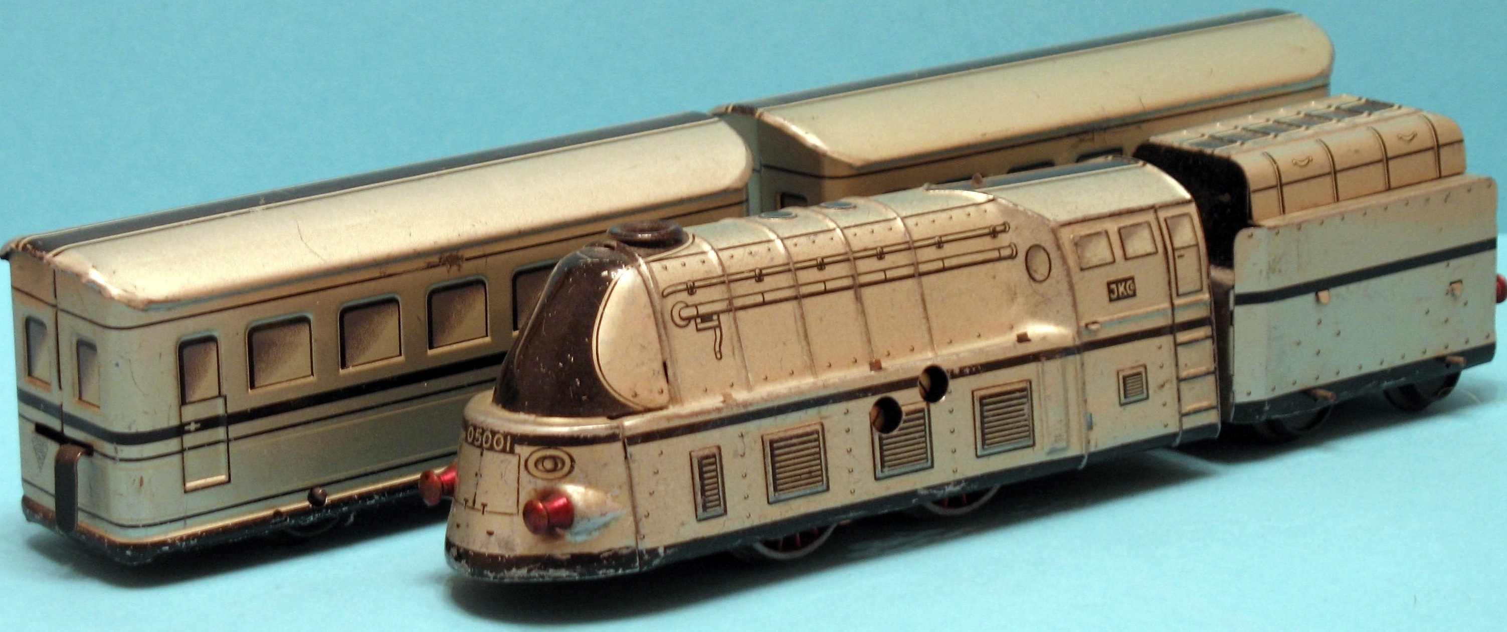 05001 Stromlinienlok der Fa. Kraus Fandor